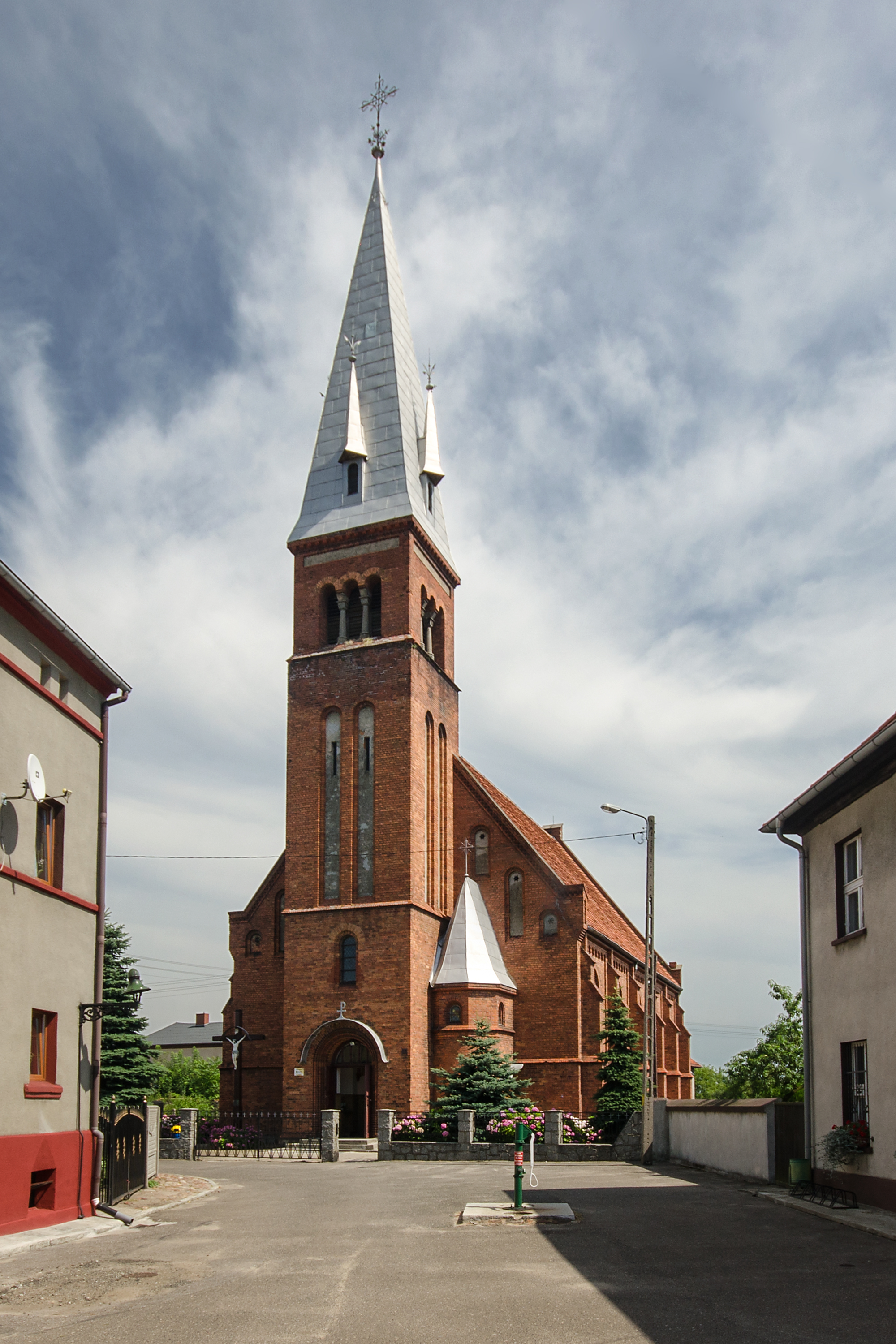 Wińsko - rzymskokatolicki kościół parafialny pw. św. Michała Archanioła, 1884-1886